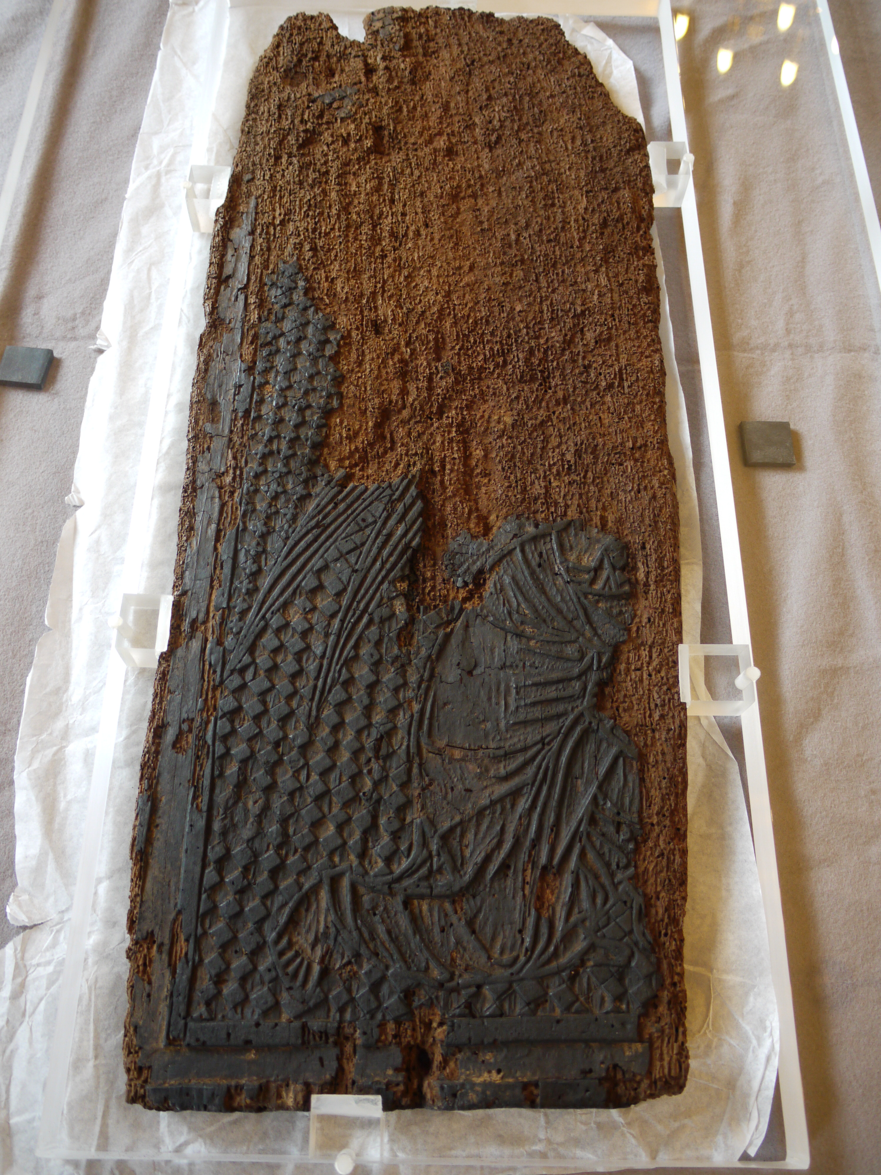 Côté Annonciation